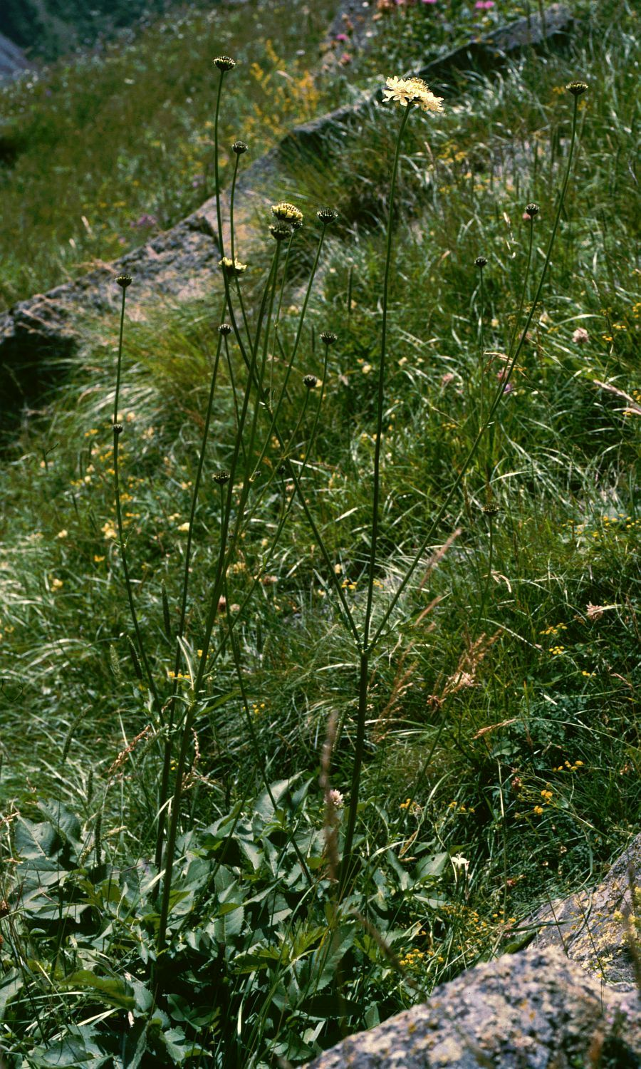 Riesen-Schuppenkopf (Cephalaria gigantea), Kardengewächse (Dipsacaceae) - Georgien/საქართველო (Sakartwelo): Großer Kaukasus, Terek-Tal, Dariali-Schlucht